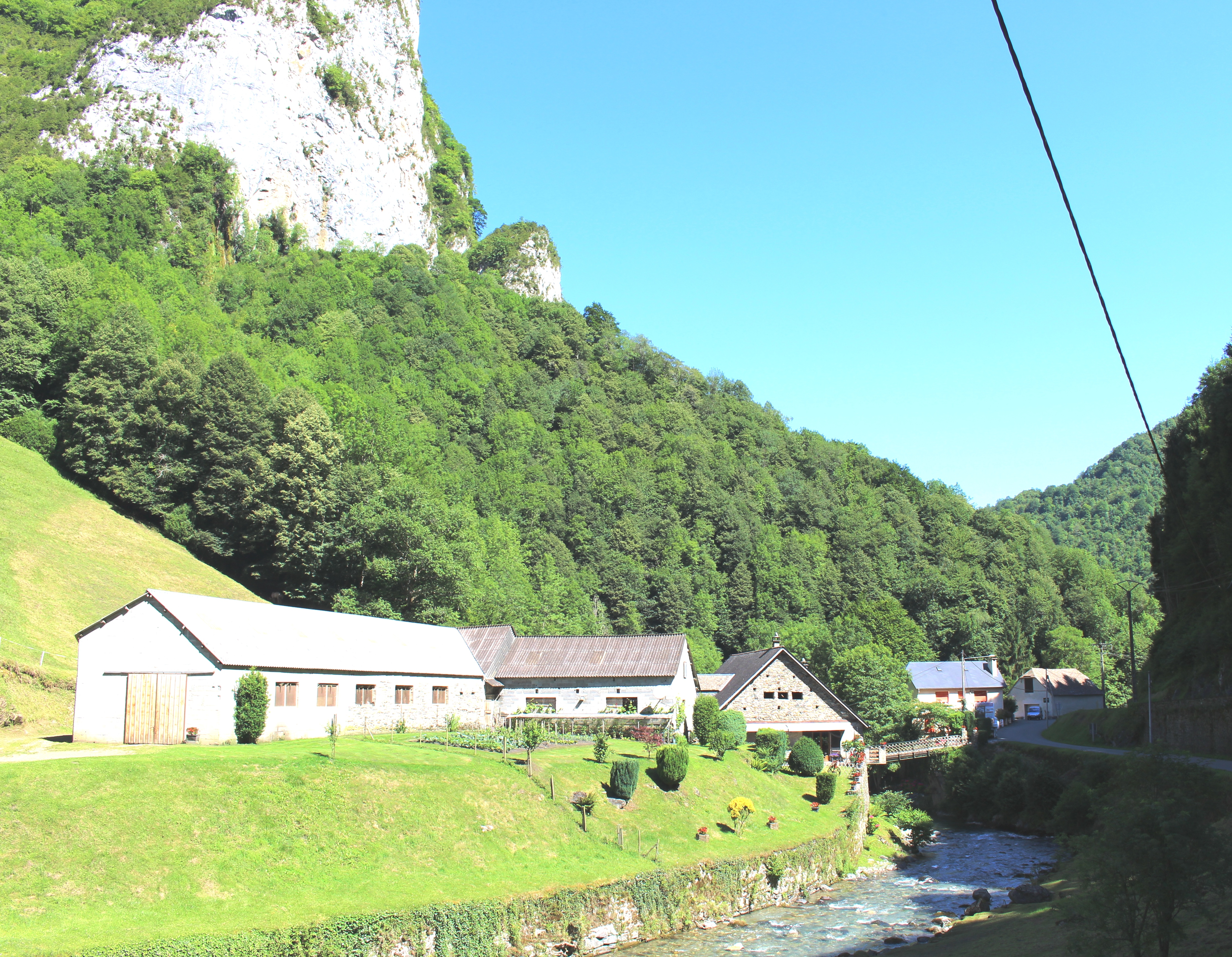 Ferrières (Hautes-Pyrénées)